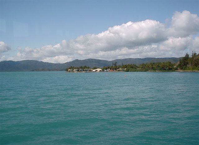 Daydreameiland (Eigen foto)